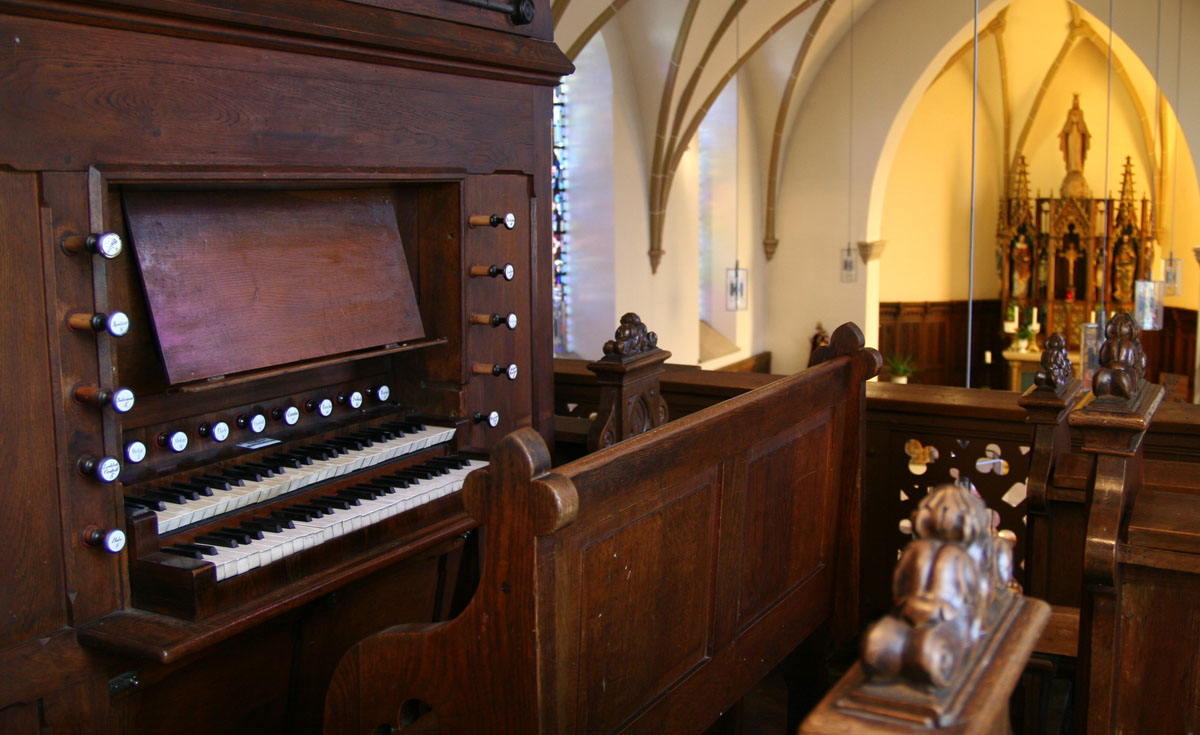 Déi historesch Daller Dalstein & Haerpfer Uergel huet 17 Regester verdeelt op 2 Manualer a Pedal.